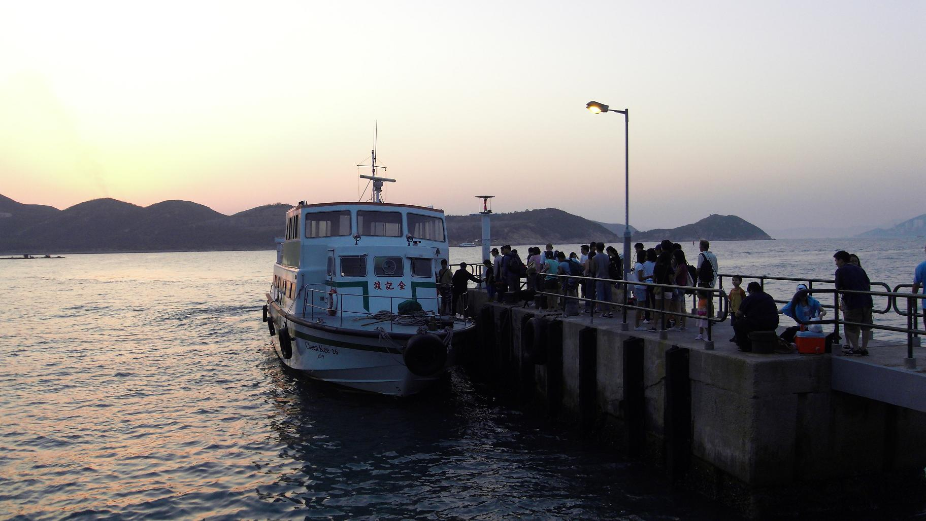 中文（香港）: 模達灣, 南丫島, 香港